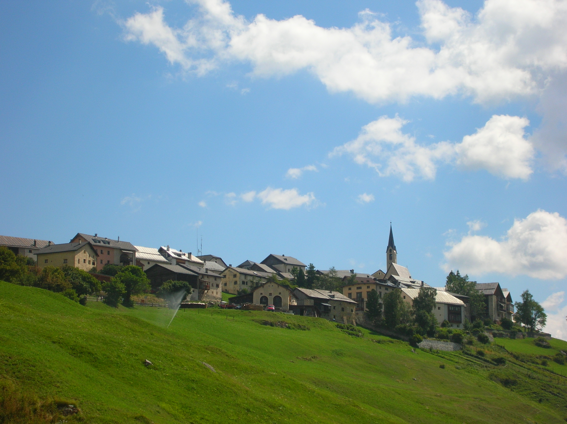 Guarda (Grisons, Suisse)